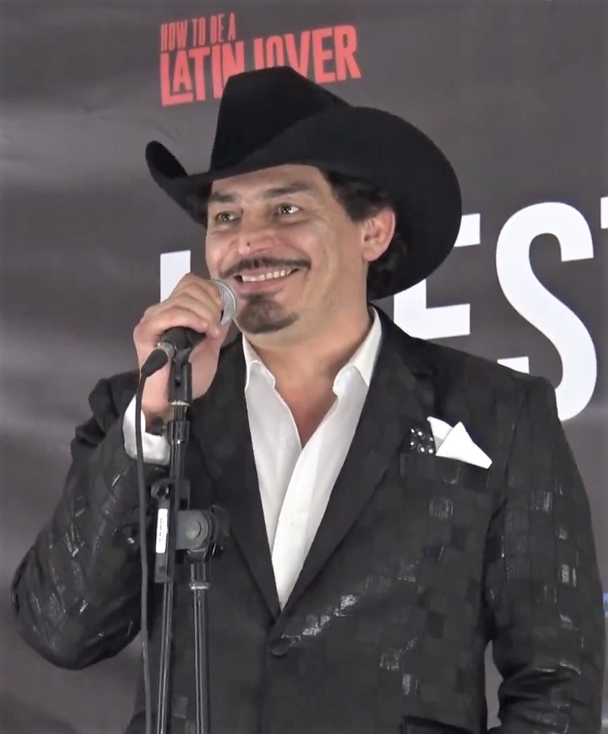 ¿Jose Manuel Figueroa apoyaría a su amigo Cuauhtémoc Blanco para gobernador? by Dulce Osuna